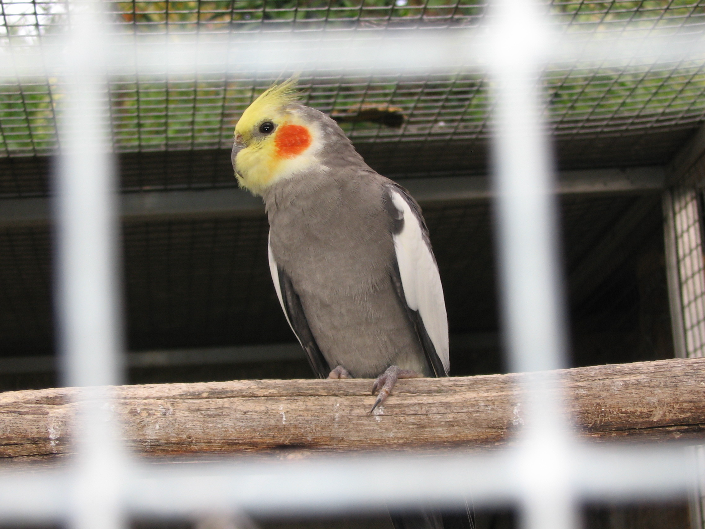 Nimfapapagáj (Nymphicus hollandicus) (botanikus kert, Funchal)